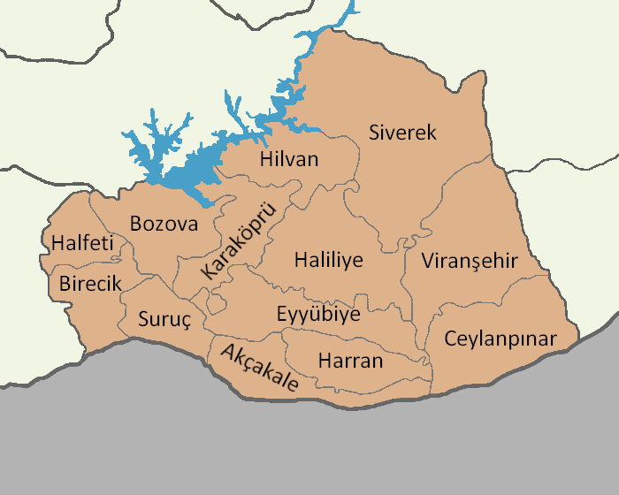 Şanlıurfa ilçeleri gösteren harita